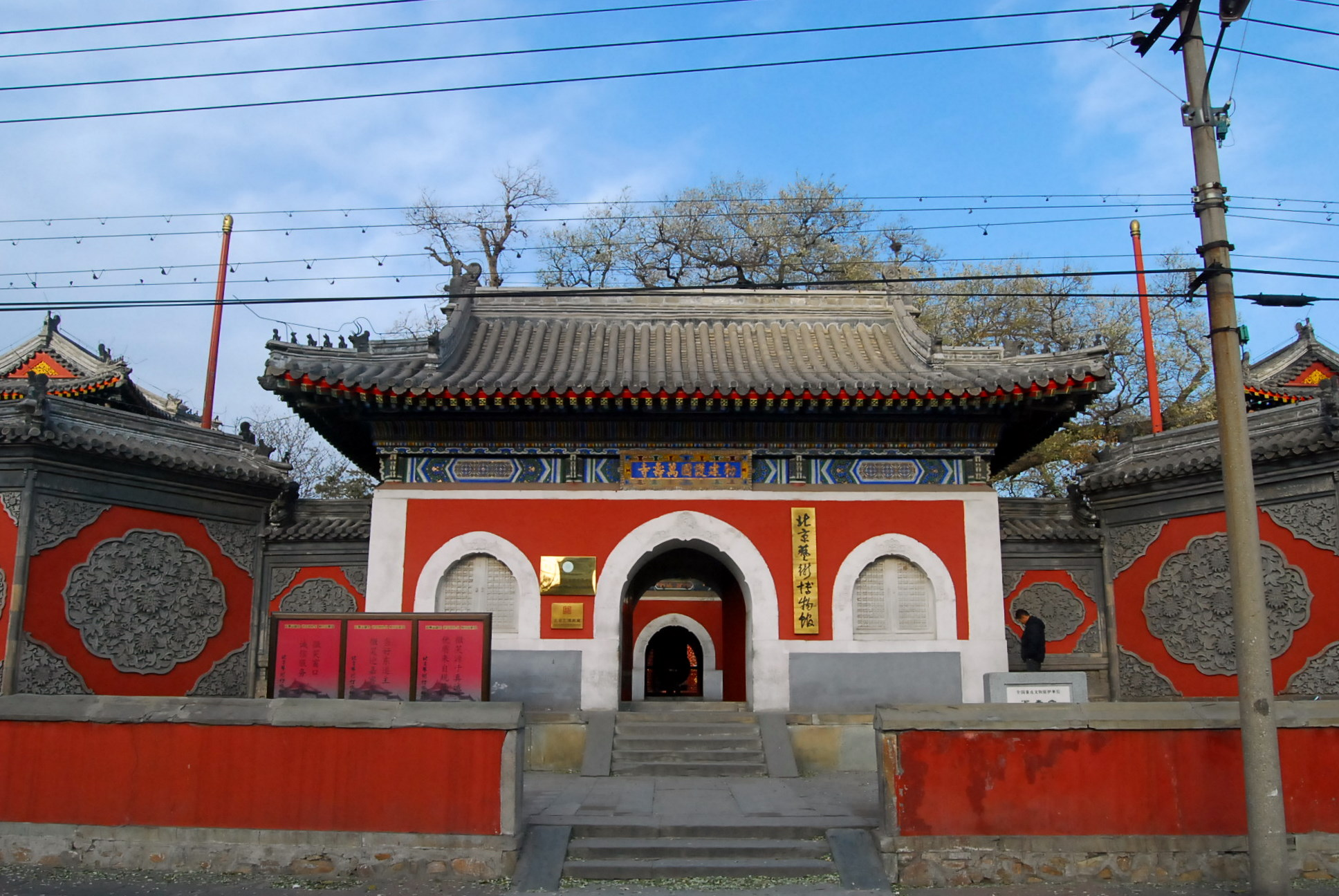 万寿寺正门